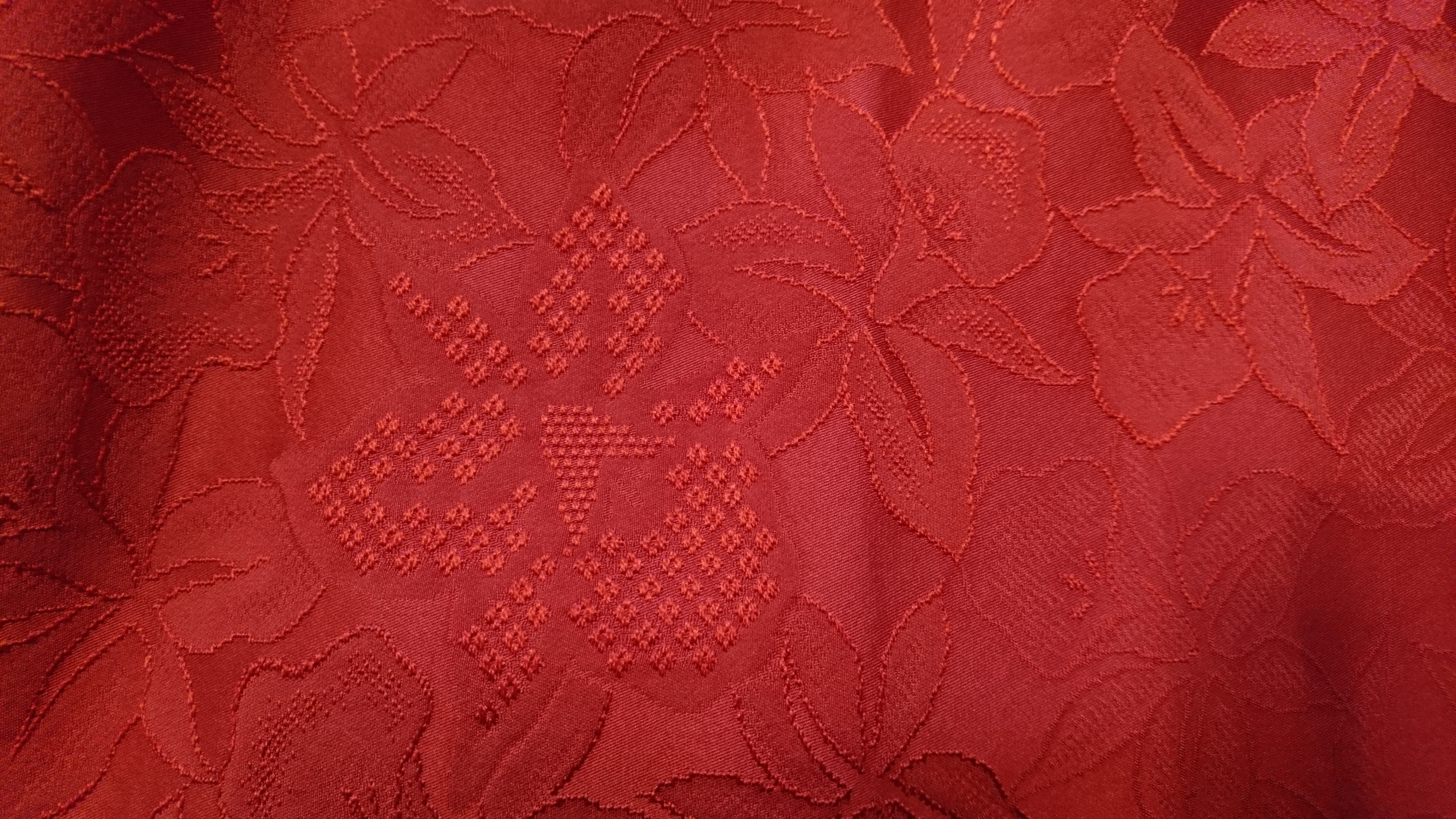 丹後縮緬の朱子織りの布地（染色後）